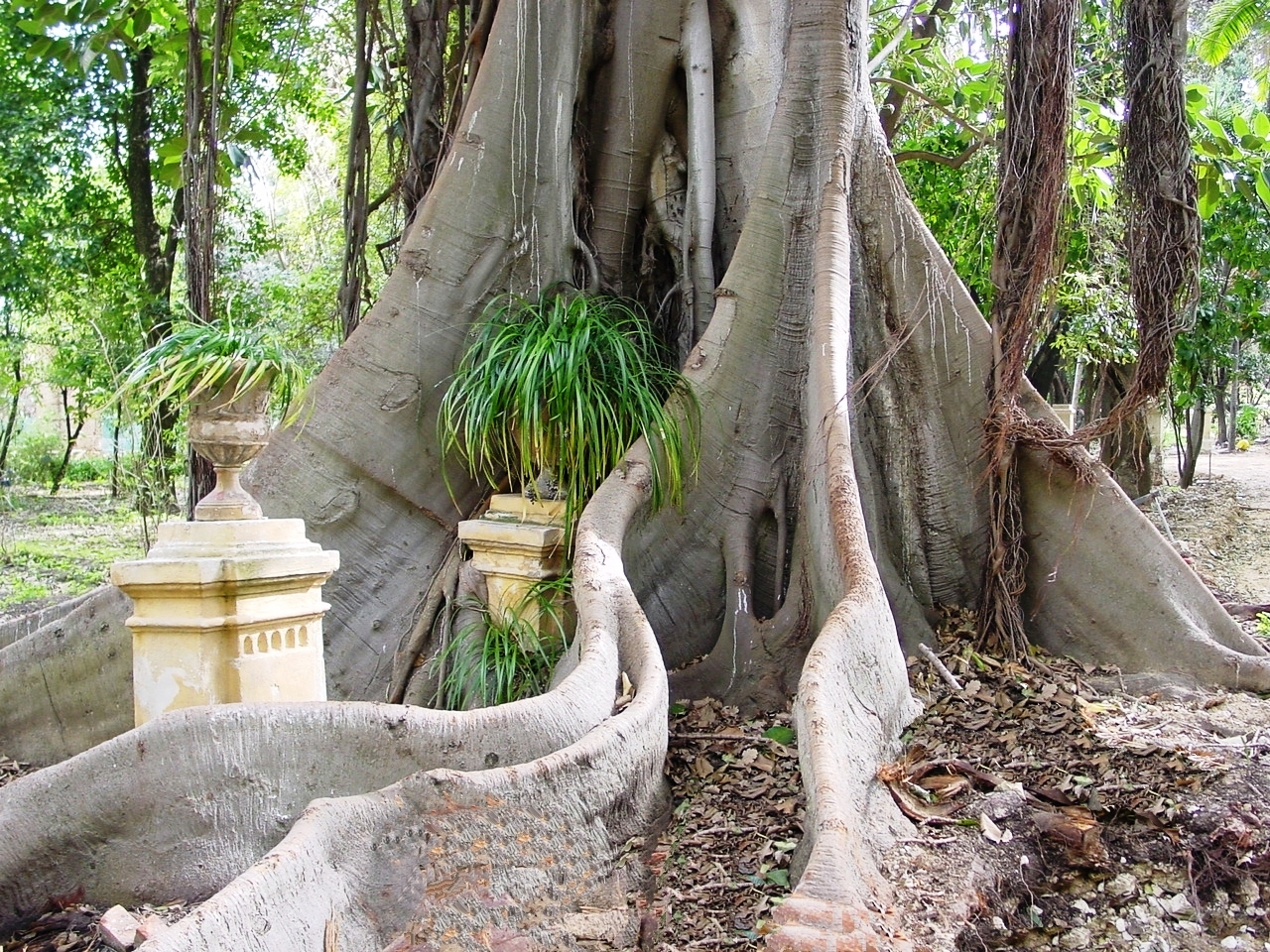 Ficus macrophylla (sin. Ficus magnolioides) Orto botanico , Palermo - 2006